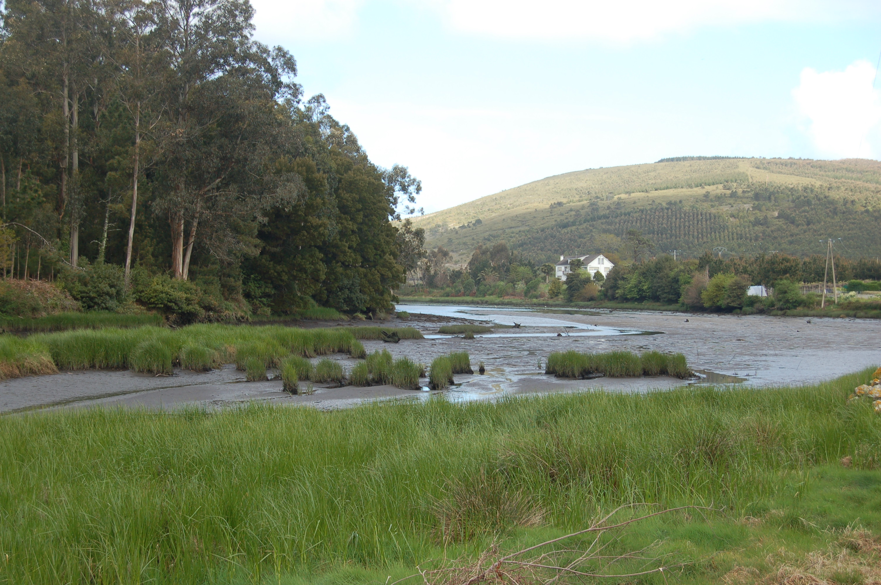 Desembocadura do río Castro en Lires (Cee).